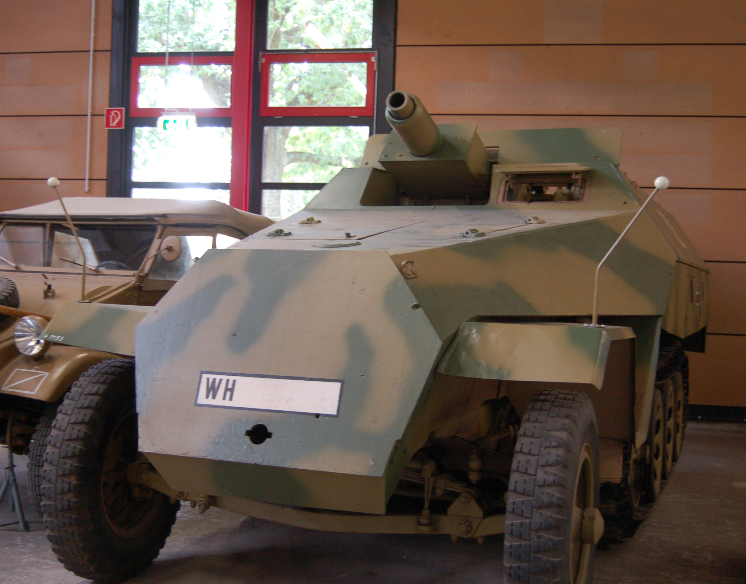 Mittlerer Schützenpanzer (Sd.Kfz 251/9) Ausf. D "Stummel" Besatzung: 3 Soldaten Gewicht: 8,53 Tonnen Motorleistung: 74 kW (100 PS) Bewaffnung: 7,5 cm KwK 37 L/24 sowie 2 MG 34 od. MG 42, Kaliber 7,92 x 57 Baujahr: 1943 - 1945 Stückzahl: 1.141